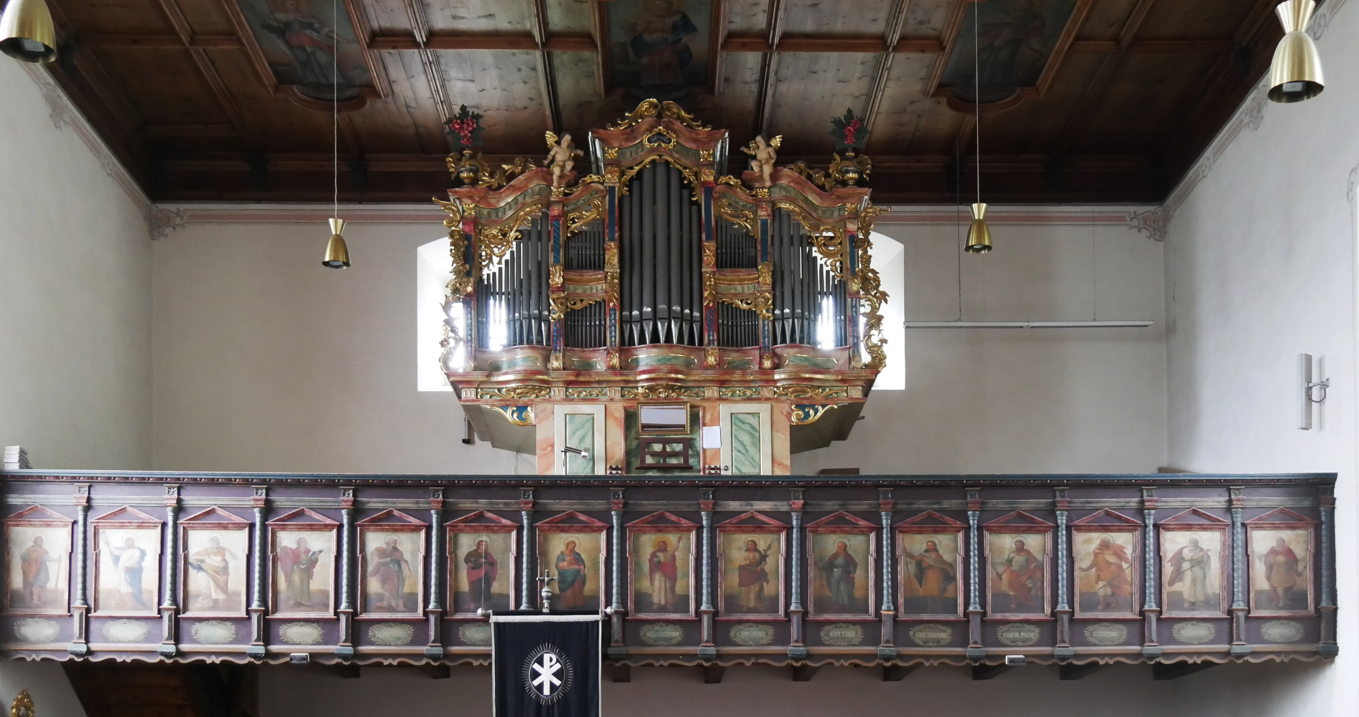 Historische Orgel in der Kirche von Bartholomäberg/Montafon/Vorarlberg